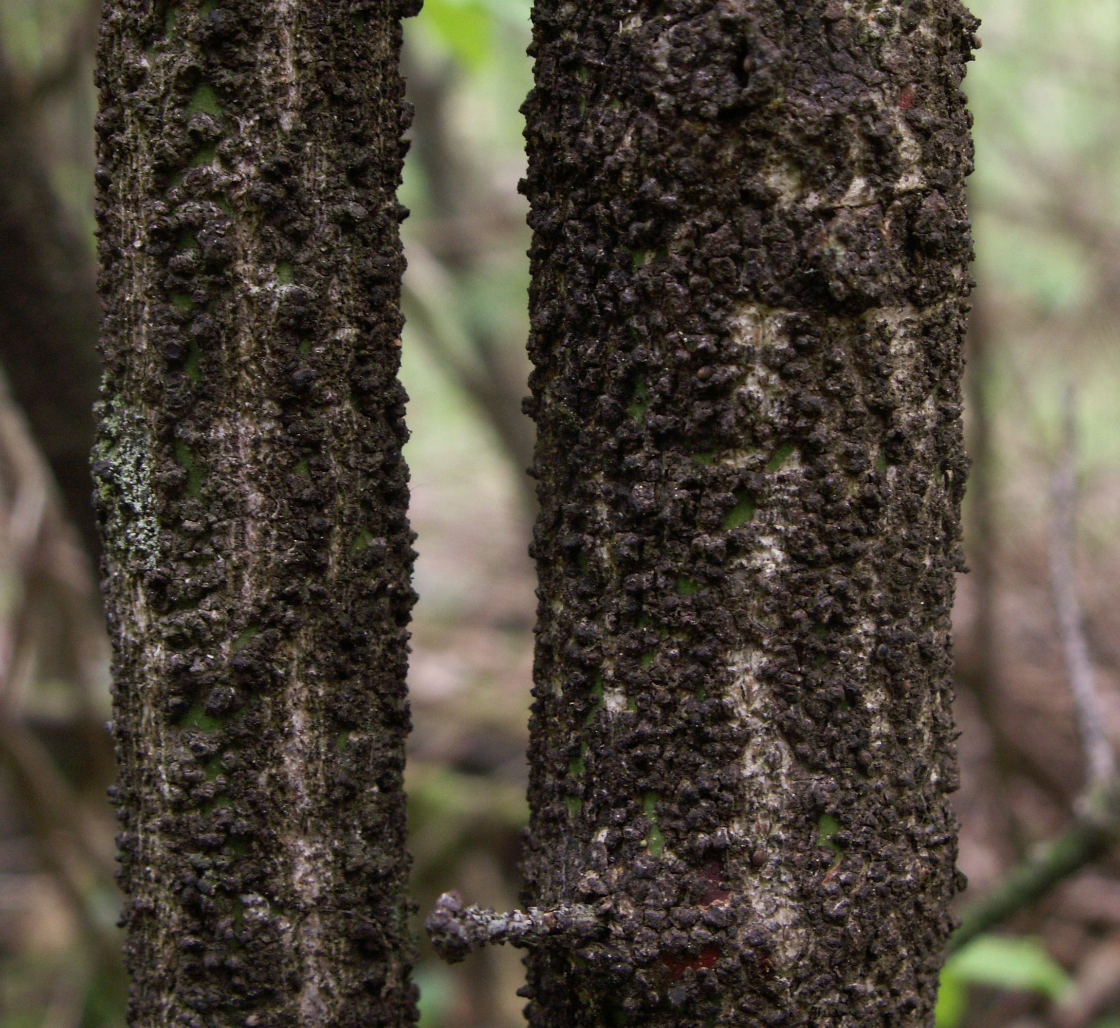 Euonymus verrucosa, zweige